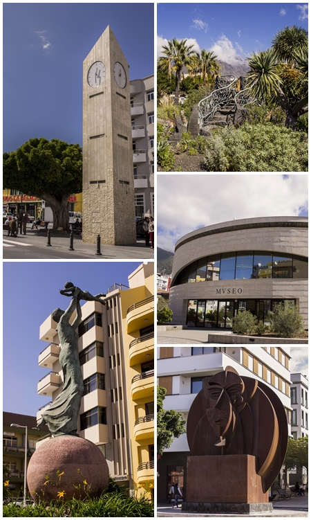 Collage con los monumentos más destacados de la ciudad de Los Llanos de Aridane